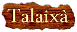 Logotipo de Talaixà